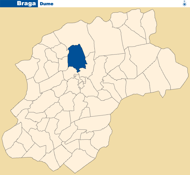 Localização de Dume no concelho de Braga.